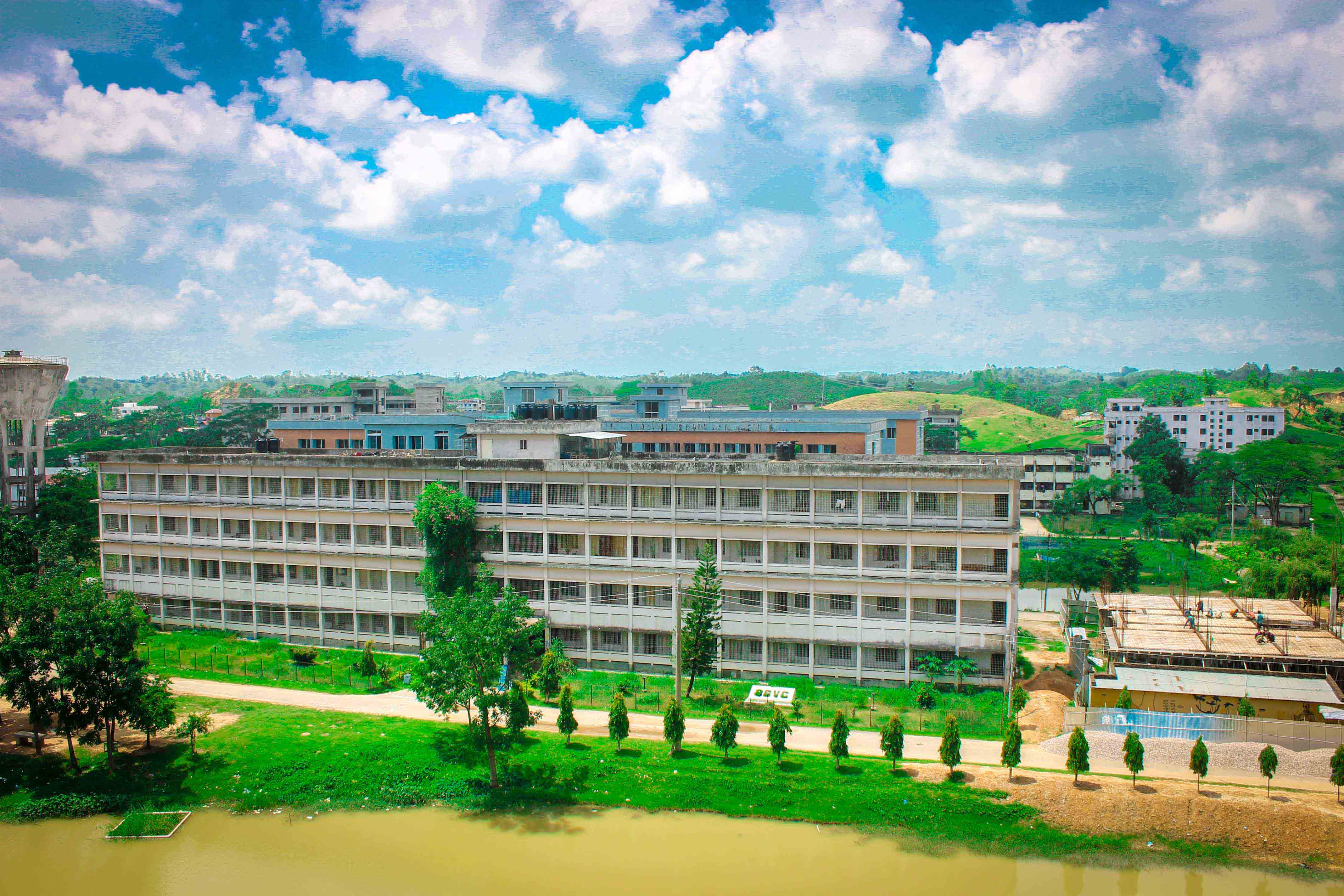 ভেটেরনারি এন্ড এনিম্যাল সায়েন্স অনুষদ এবং বৈশাখী চত্বর, সিলেট কৃষি বিশ্ববিদ্যালয়।